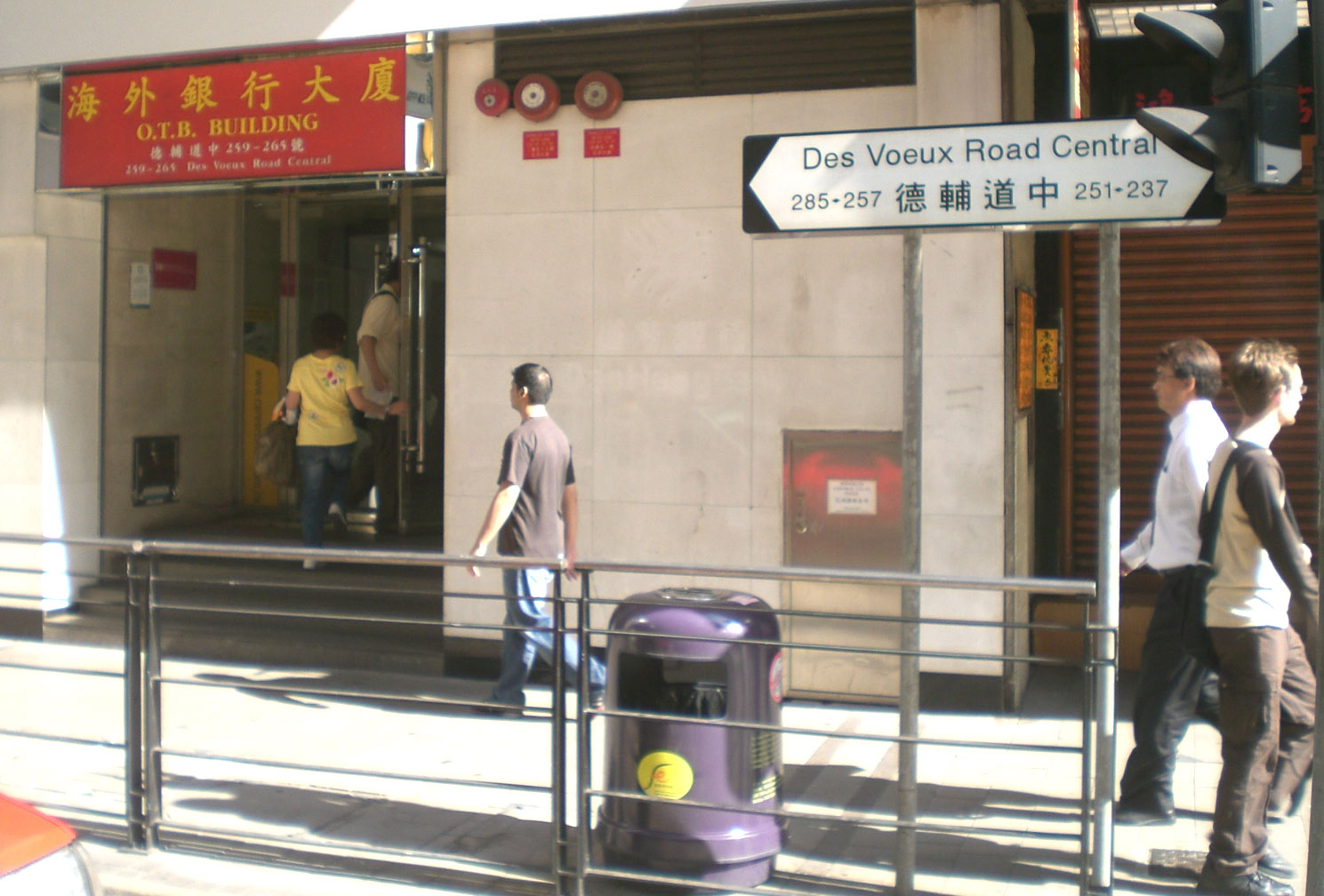 前海外信託銀行上環德輔道中分行, Des Voeux Road